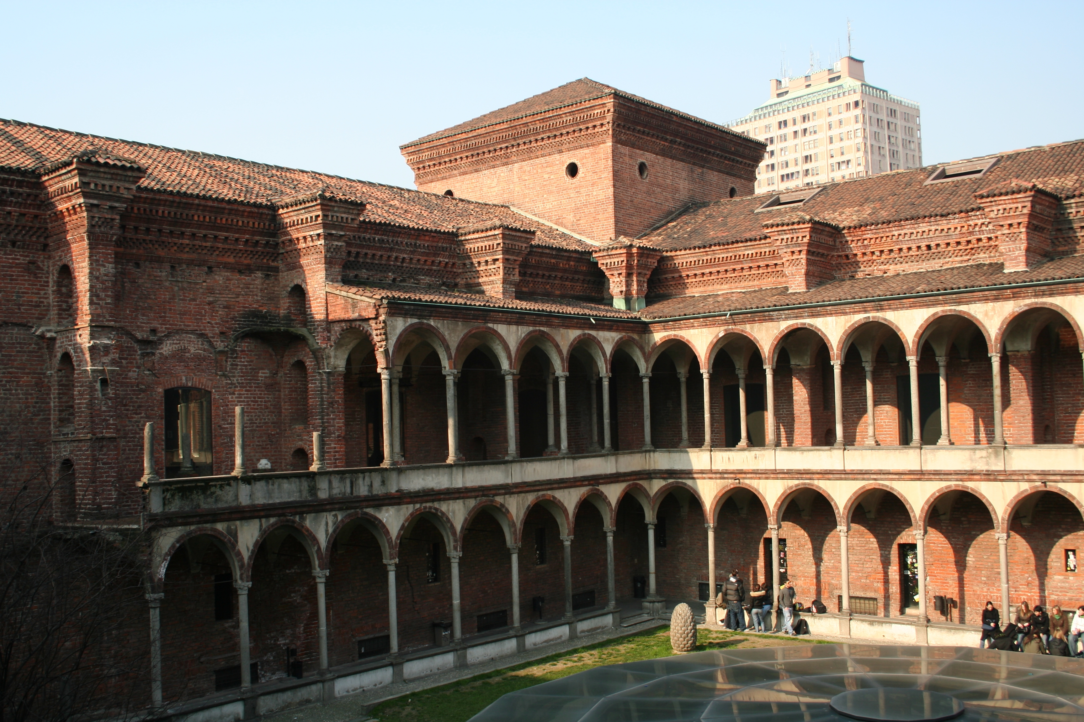 Cortile Ghiacciaia Università di Milano